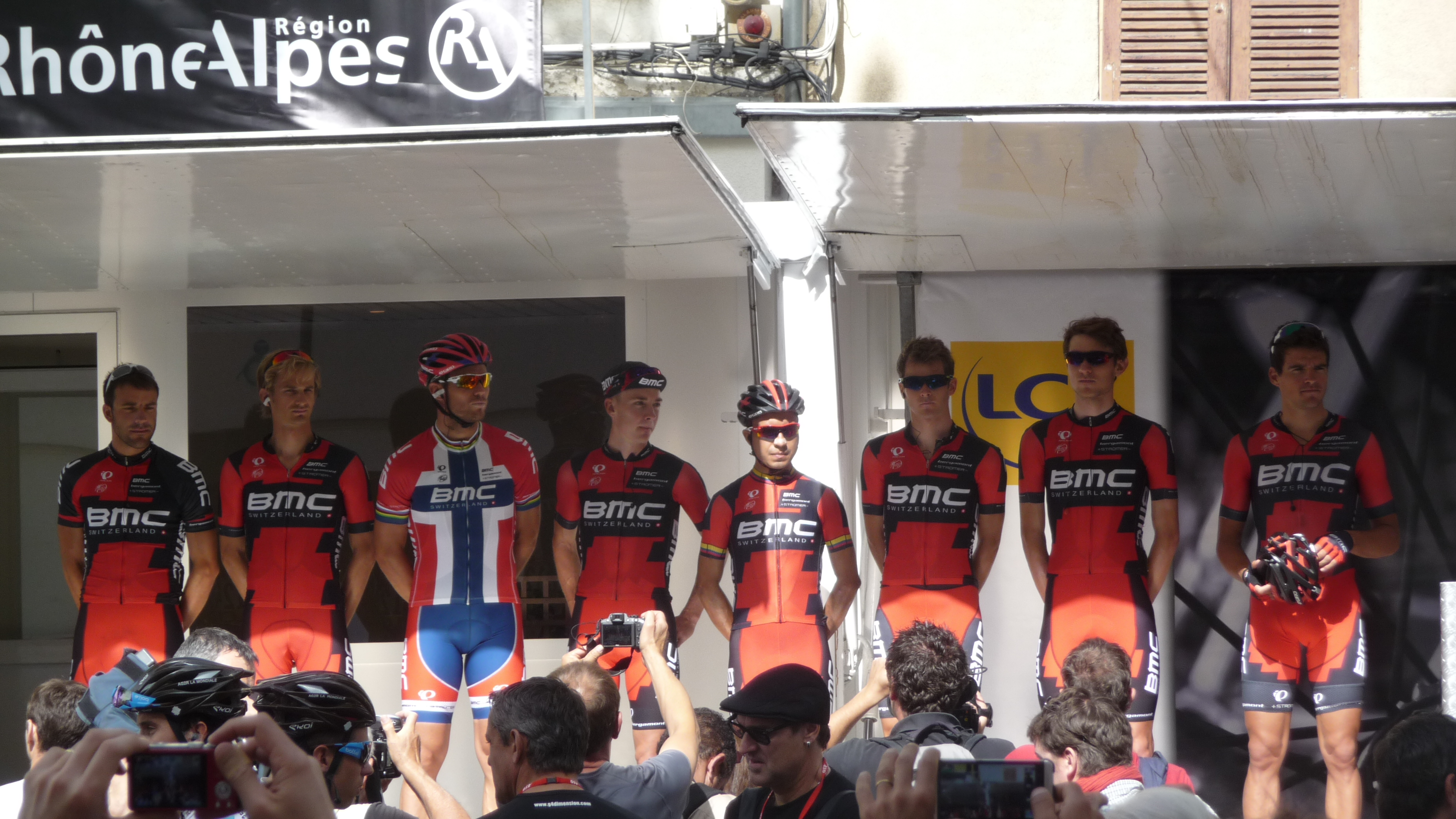 Présentation des équipes du Critérium du Dauphiné 2014 lors du départ de la 2ème étape à Tarare.